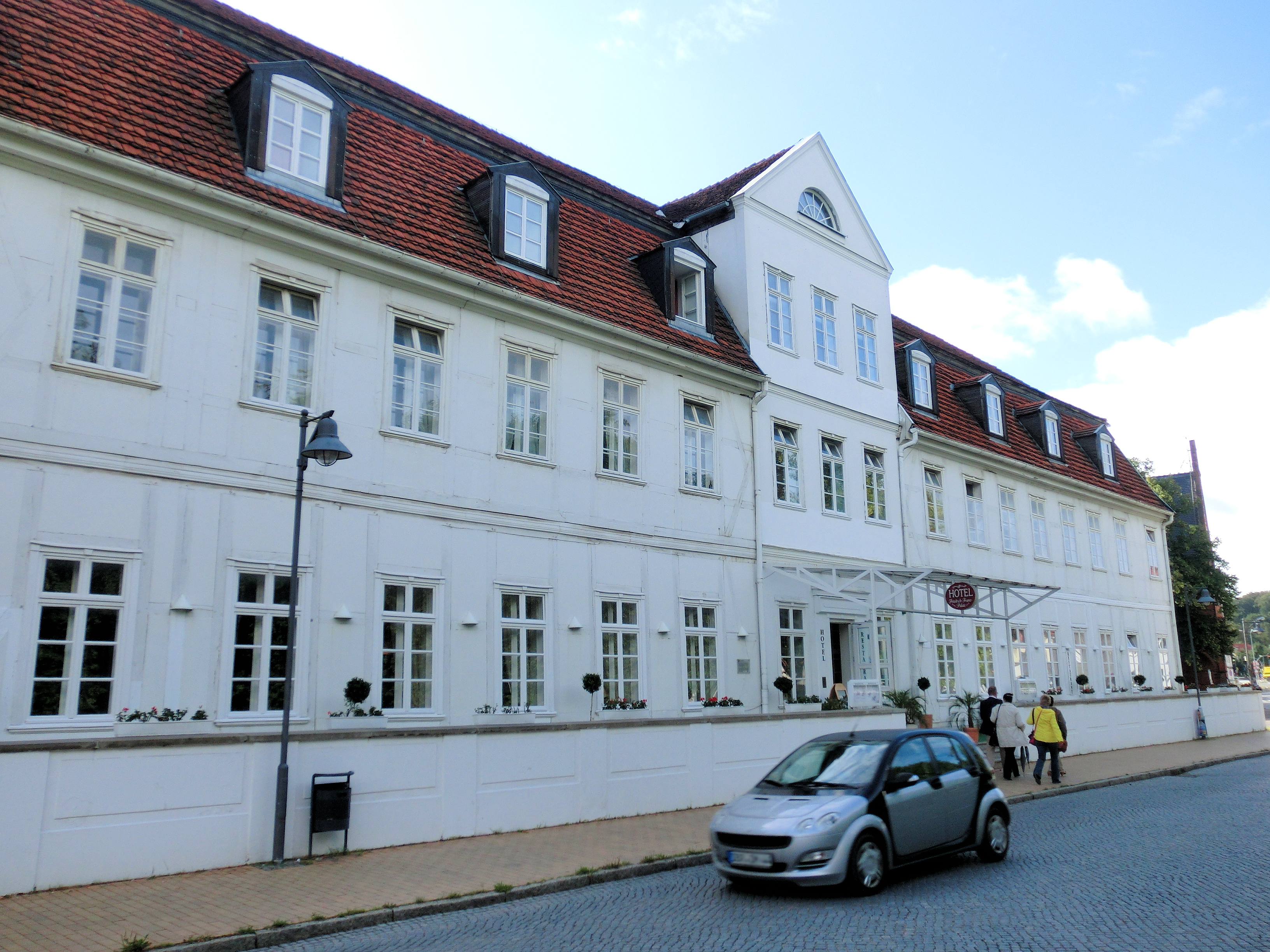 Bad Doberan August-Bebel-Straße 2, Baudenkmal. Es beherbergt das Hotel "Friedrich Franz Palais" mit Sternerestaurant.